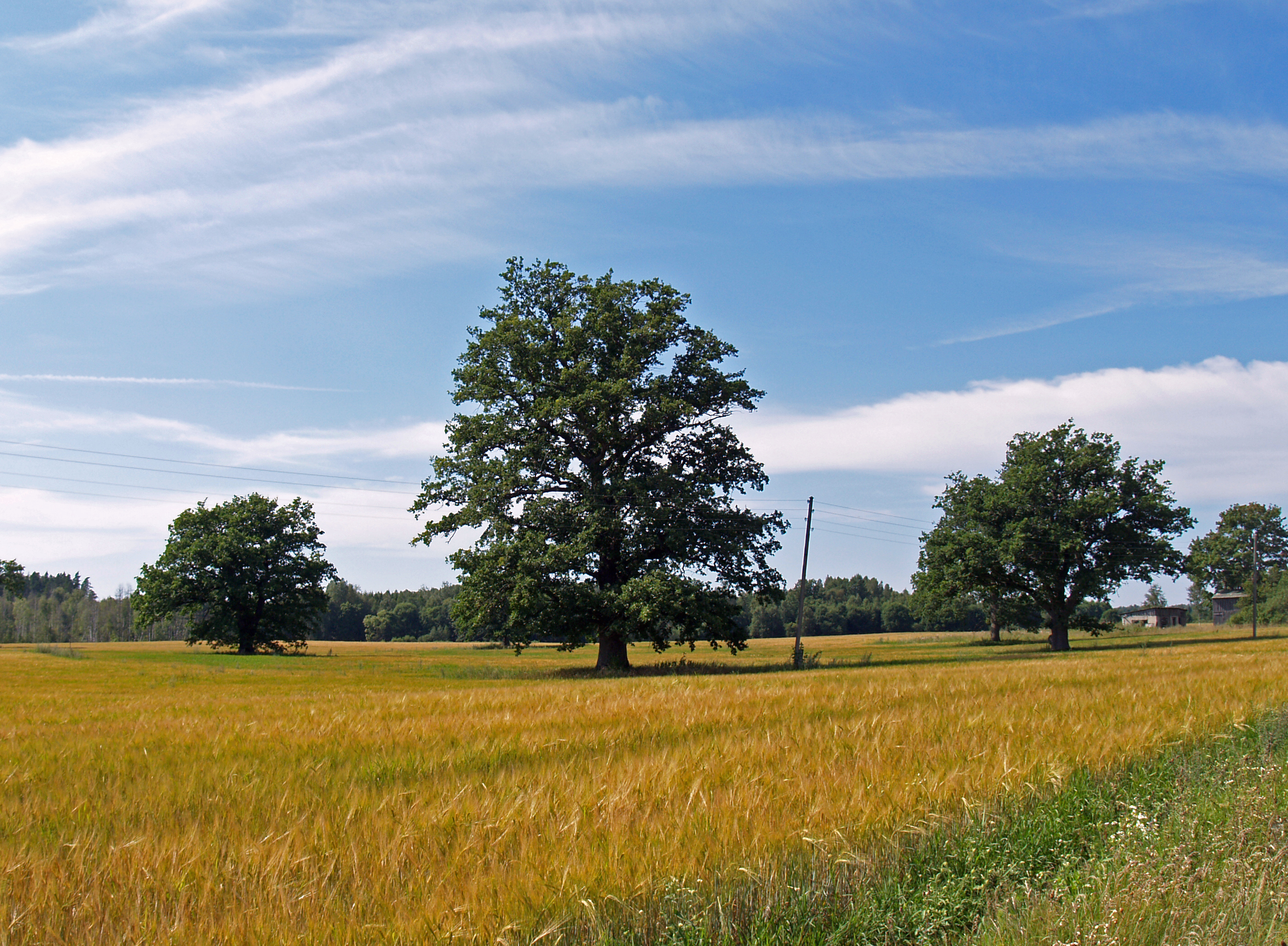 Ozolmuižas ozoli (Ozolmuiza oaks)